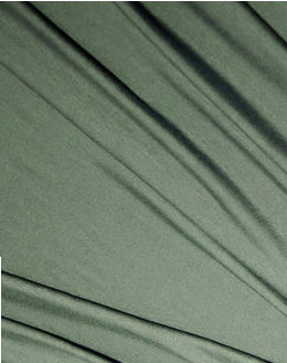 Imagem de um tecido